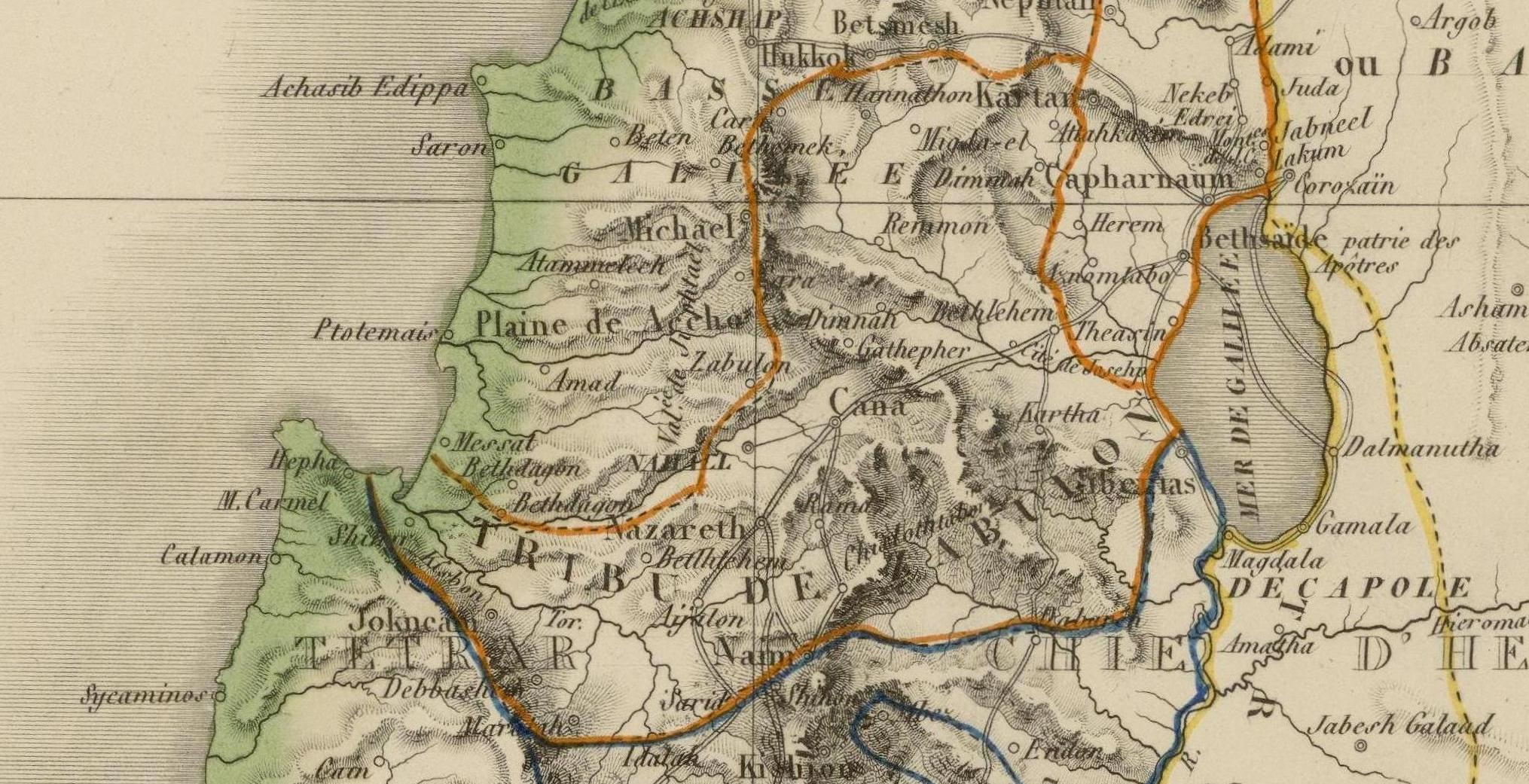 Carte de la Palestine : pour servir à l'intelligence de la Sainte Écriture et particulièrement à l'histoire de la Notre Seigneur Jésus-Christ / dressée par A. Toussaint. Échelle(s) : [ca 1:488 000], 8 lieues communes de France [= 7,3 cm]. E 34°18' - E 36°19' / N 33°30' - N 31°20'.